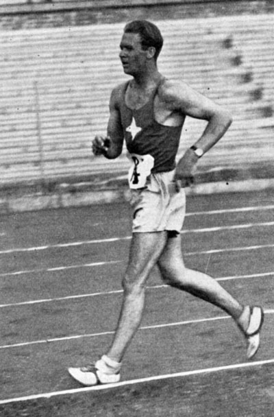 Jan Mikaelsson